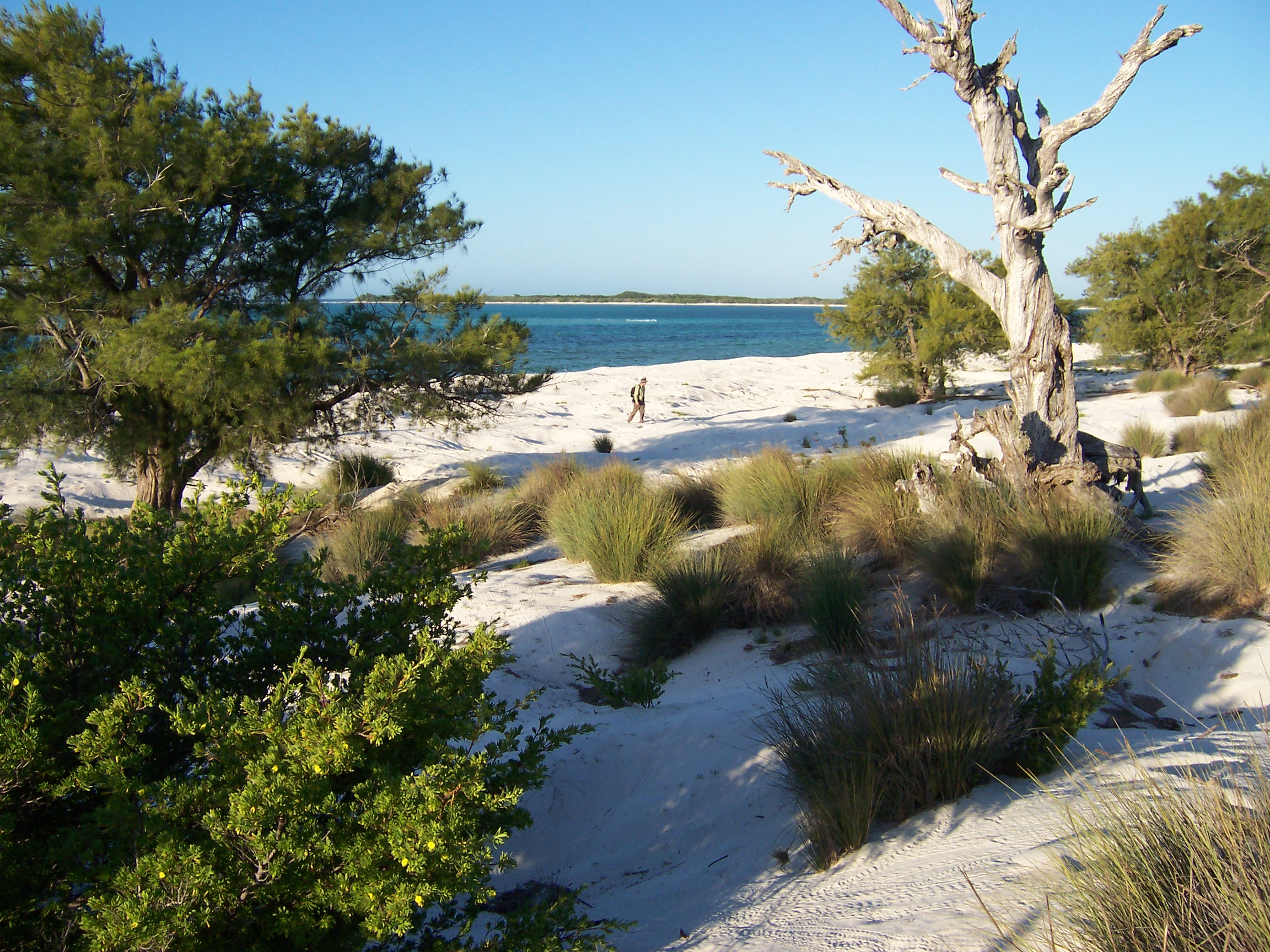 Paysage de dunes littorales du nord de l'île Europa - Photo personnelle B. Navez (7 juillet 2005) sous GNU FDL GFDL Vous avez la permission de copier, distribuer et/ou modifier ce document selon les termes de la licence de documentation libre GNU, version 1.2 ou plus récente publiée par la Free Software Foundation ; sans sections inaltérables, sans texte de première page de couverture et sans texte de dernière page de couverture. B. Navez